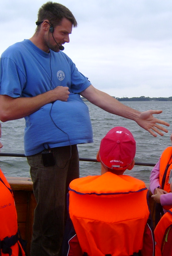 Elida-Skipper M. Saal als Moderator und Prediger während einer Ausfahrt auf dem Strelasund 2005